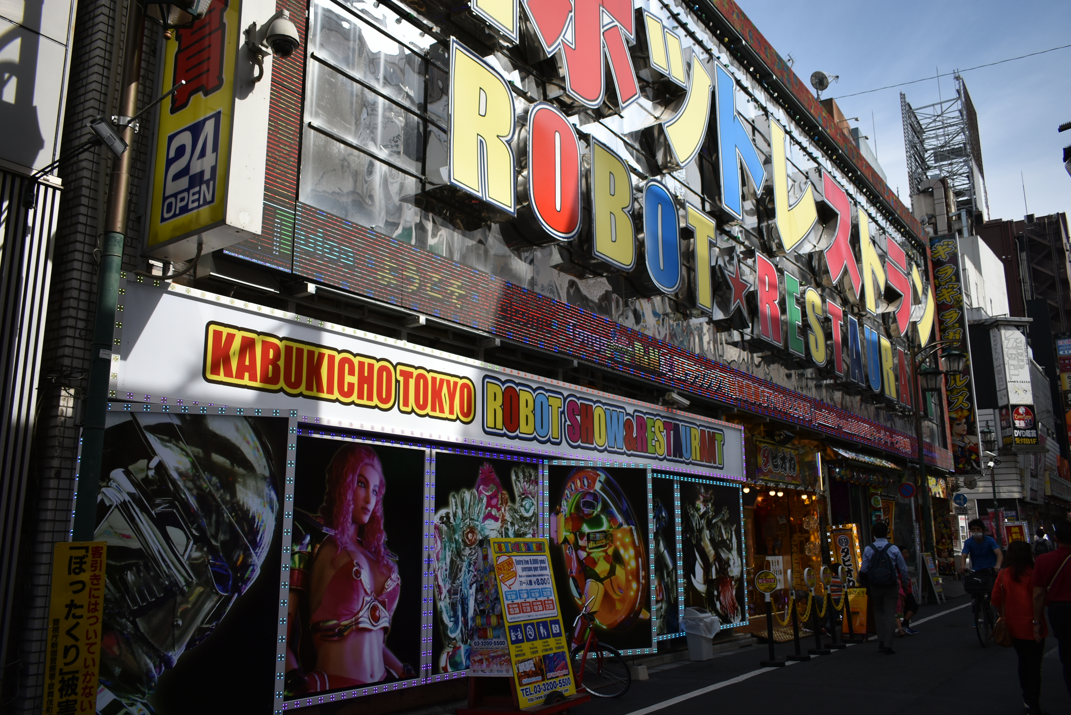 ロボットレストラン Nikon D3400